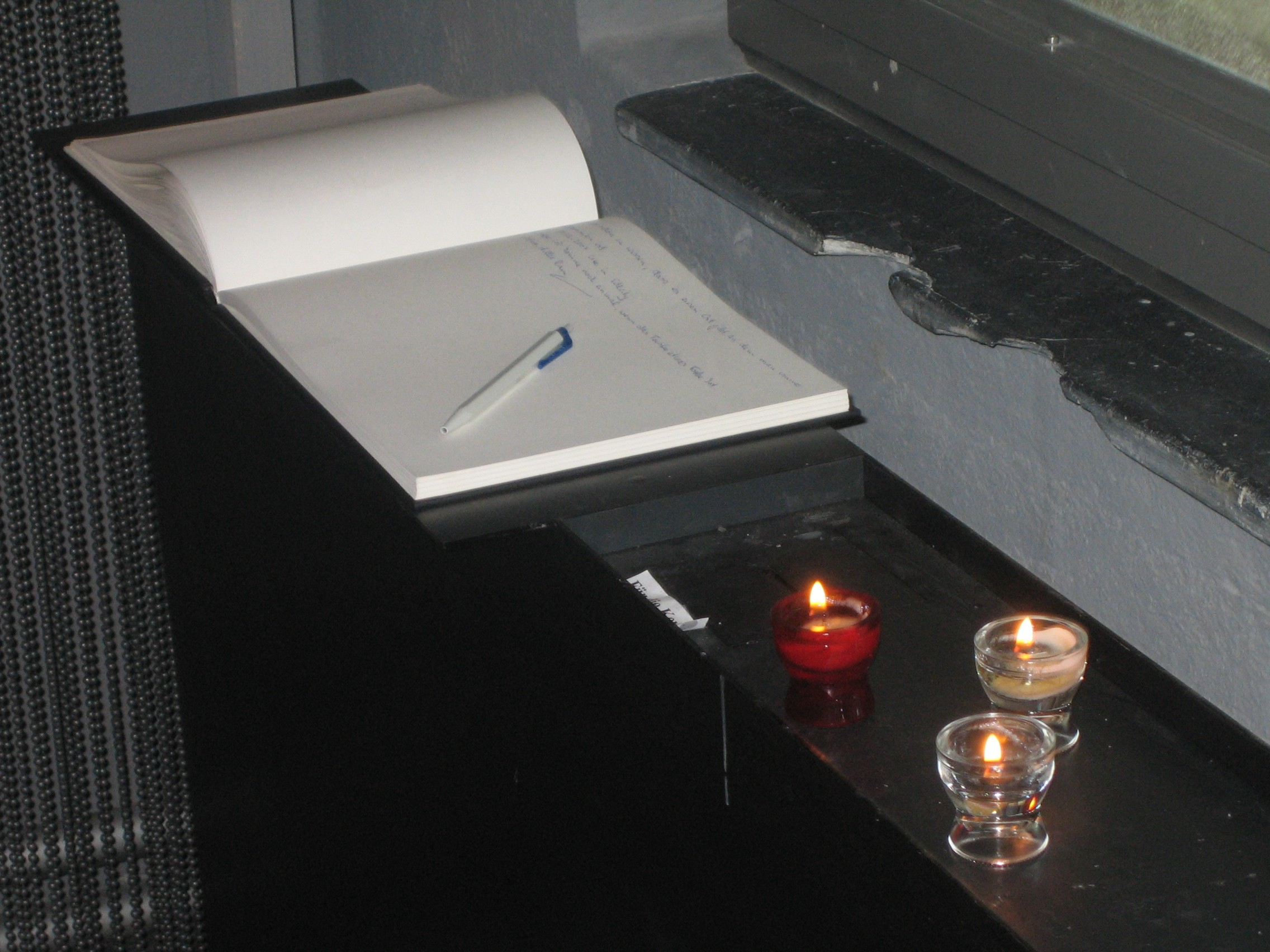 Kerzen und Anliegenbuch in der Sihlcity-Kirche von Zürich. - Foto: Jakob Vetsch, 31. März 2007.